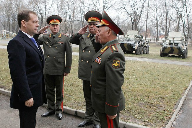 В штабе 58-й общевойсковой армии. Справа - начальник Генерального штаба Вооружённых Сил России генерал армии Николай Макаров.